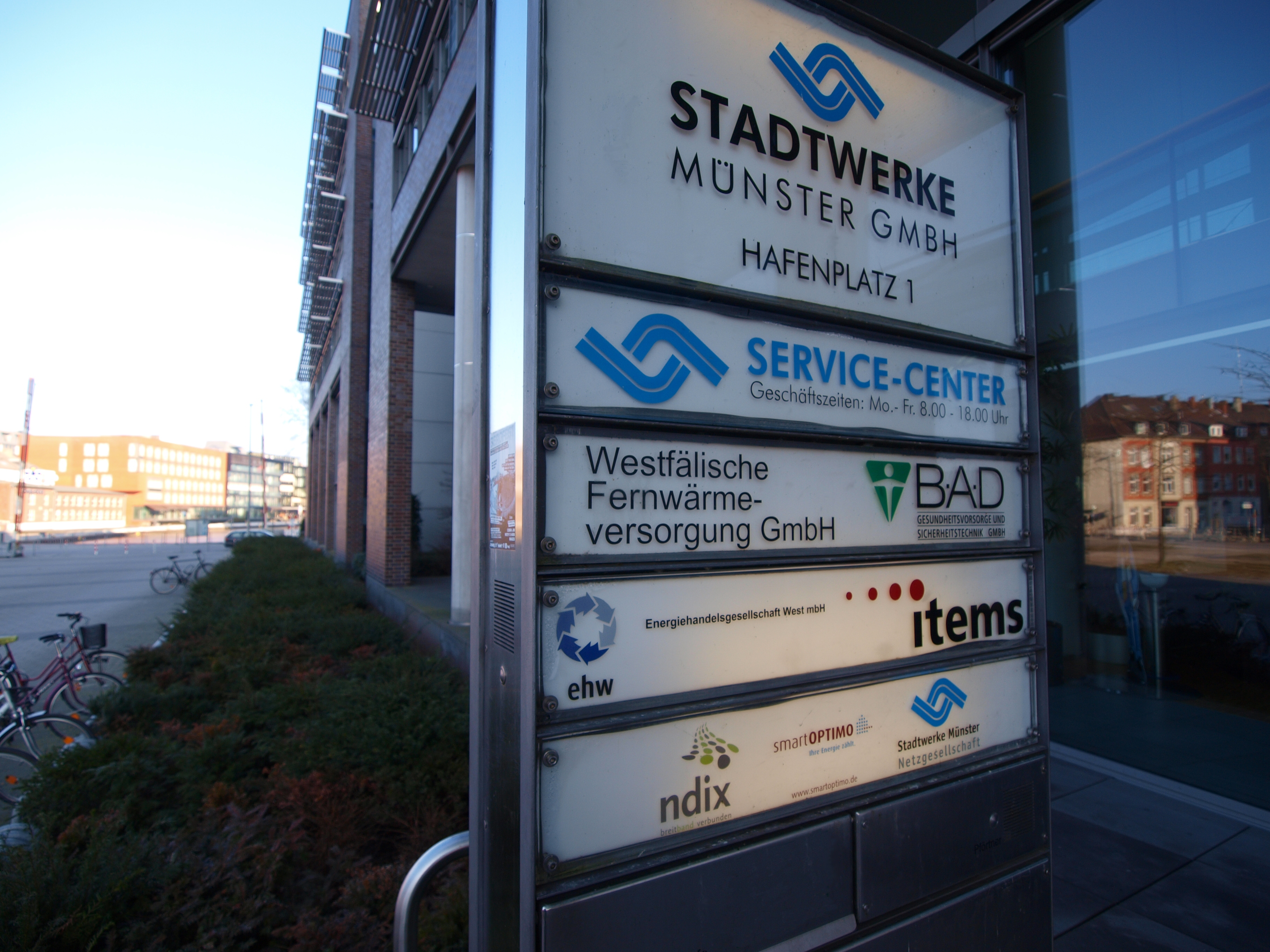 Säule am Stadtwerke-Hauptsitz in Münster